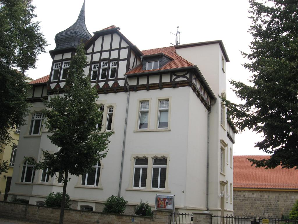 Haus der Neuapostolischen Gemeinde Quedlinburg in der Adelheidstraße